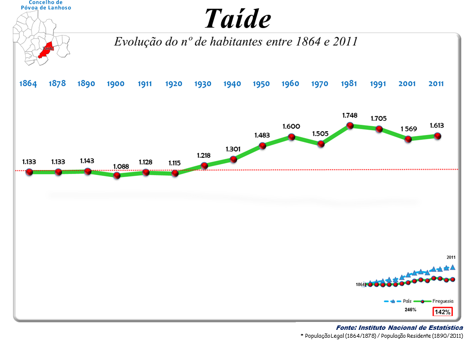 Censos 1864/2011